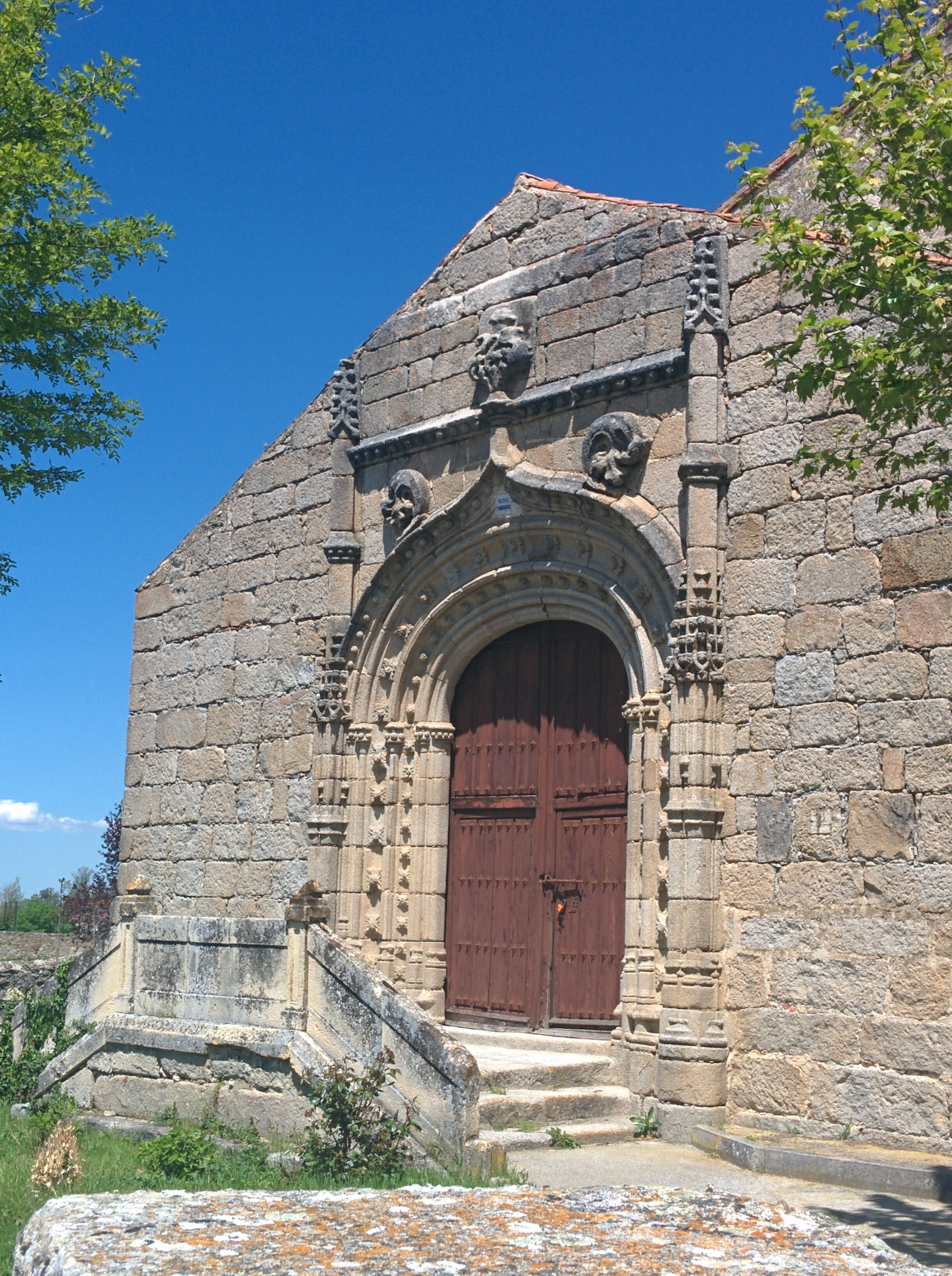 Iglesia de San Juan Evangelista, en La Losa (Segovia, España).